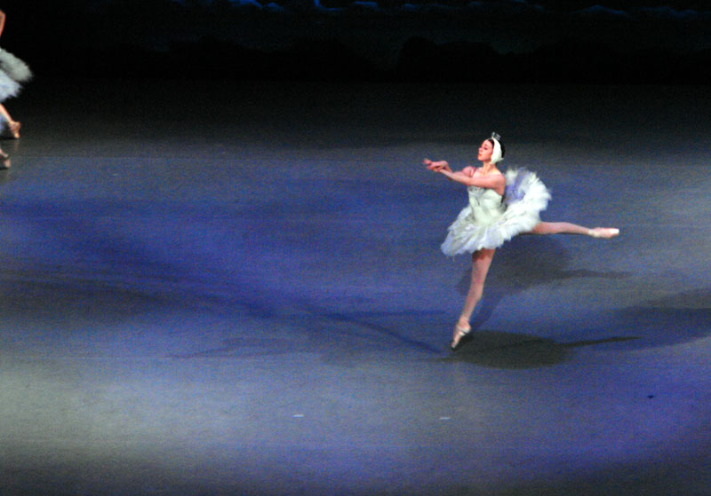 Nino Ananiashvili in Swan Lake ballet